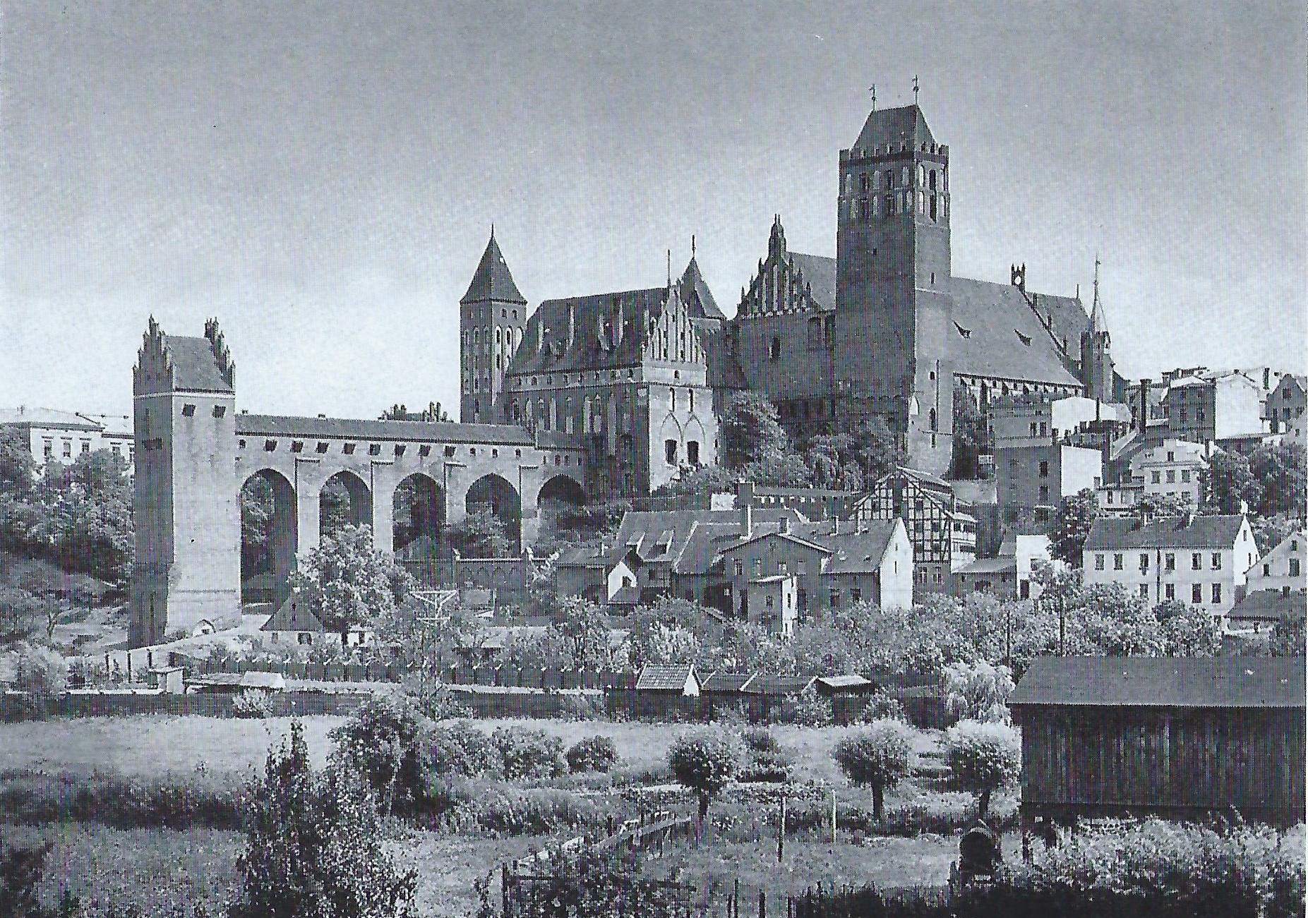 Marienwerder (Kwidzyn): Dom, Kapitelschloss und Danzker (r-l)